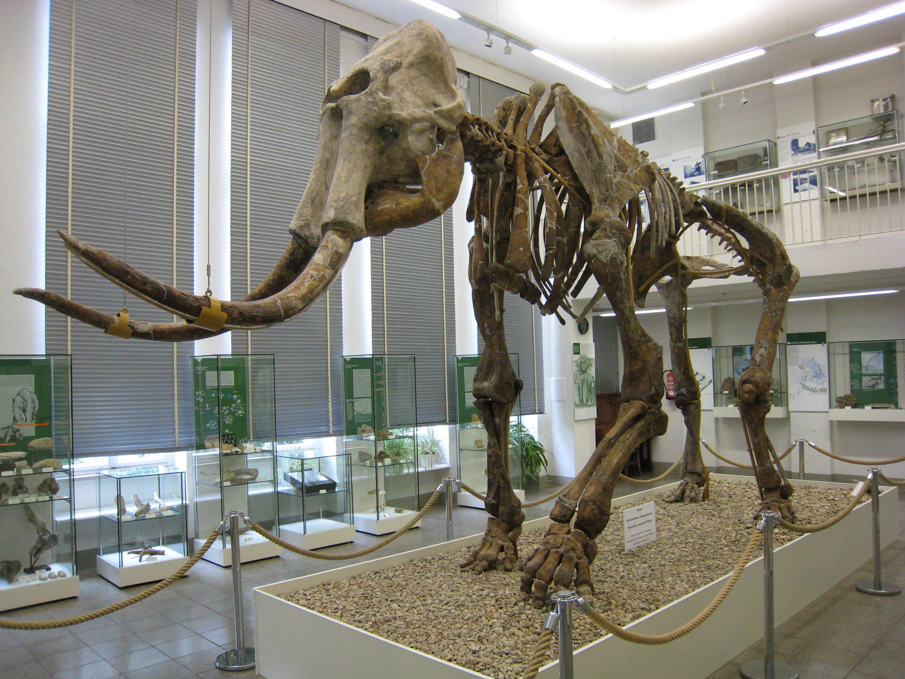 Spenglermusem in Sangerhausen 1